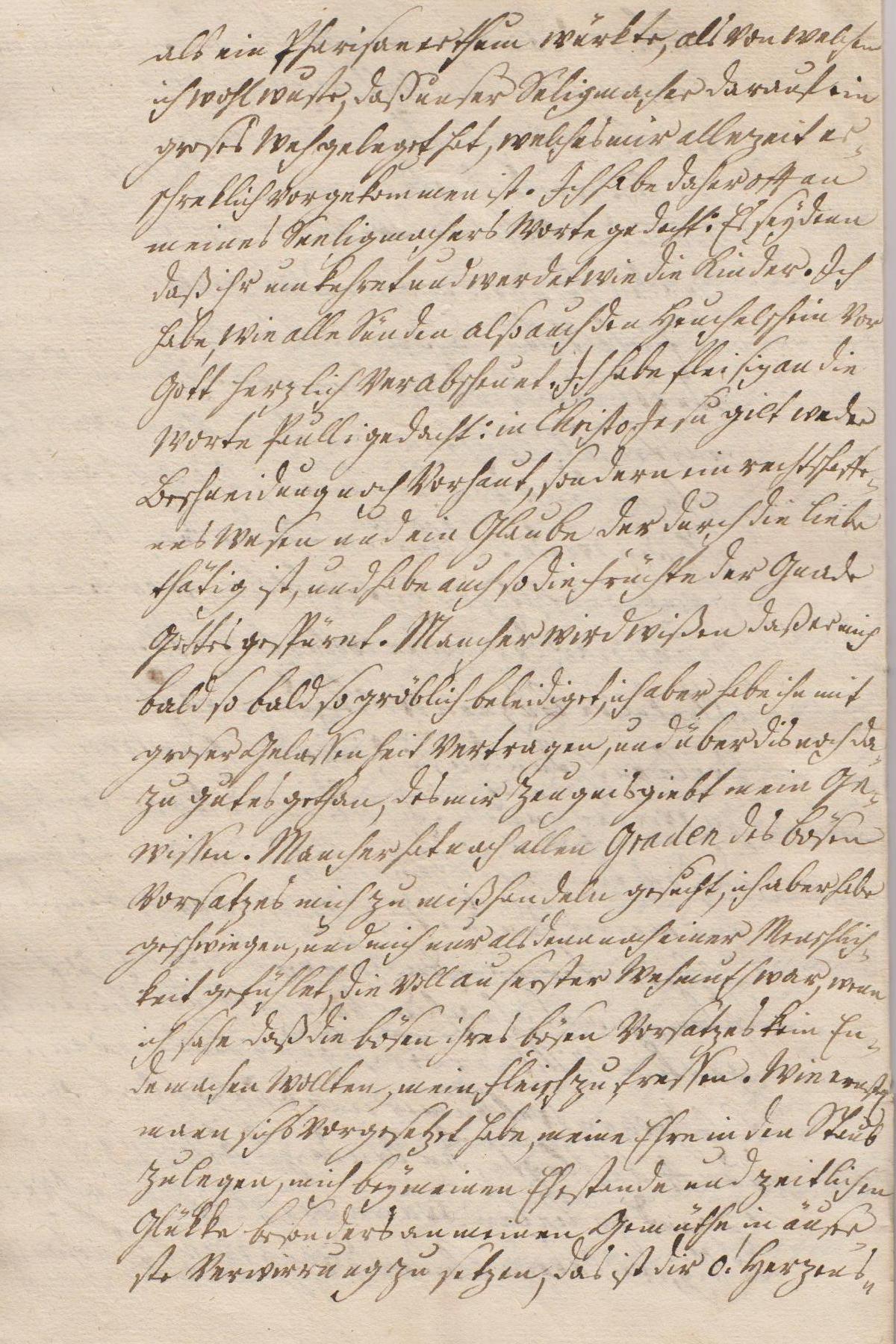 Seite 18 der Leichenpredigt für den Pastor August Wilhelm Reinhart (1696/1770), Bürger der Stadt Heringen an der Helme.